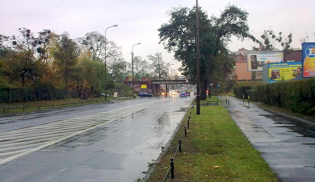 ul. Długa widok z pn. zachodu na pd. wschód, widoczny w głębi nad ulicą wiadukt kolejowy linii "Prawoodrzańskiej" (do Jelcza i Oławy)